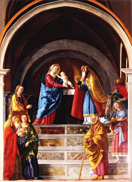 Giovanni Martini - Presentazione di Gesù al Tempio Chiesa san Andrea - Portogruaro